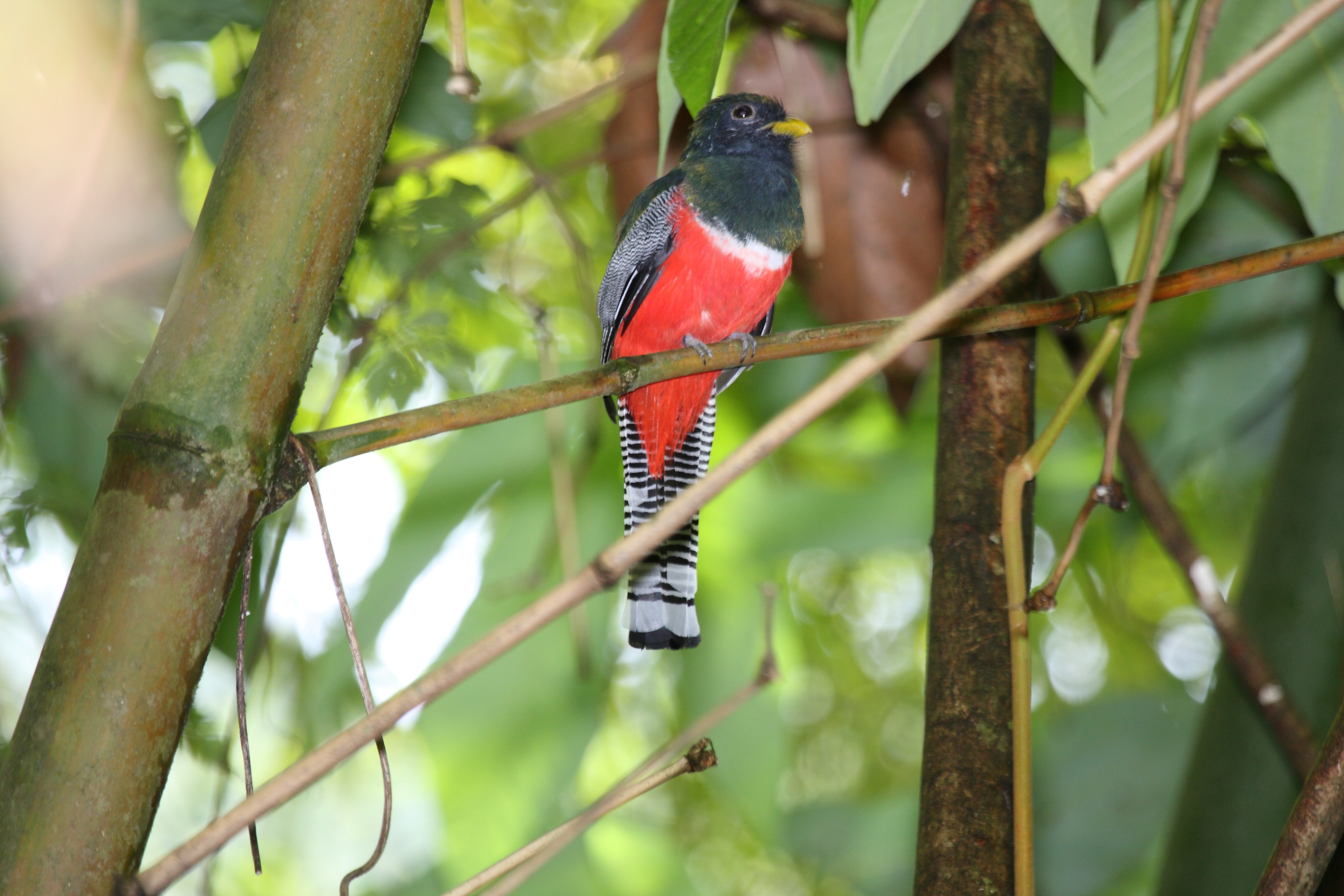 Collared Trogon (Trogon collaris)